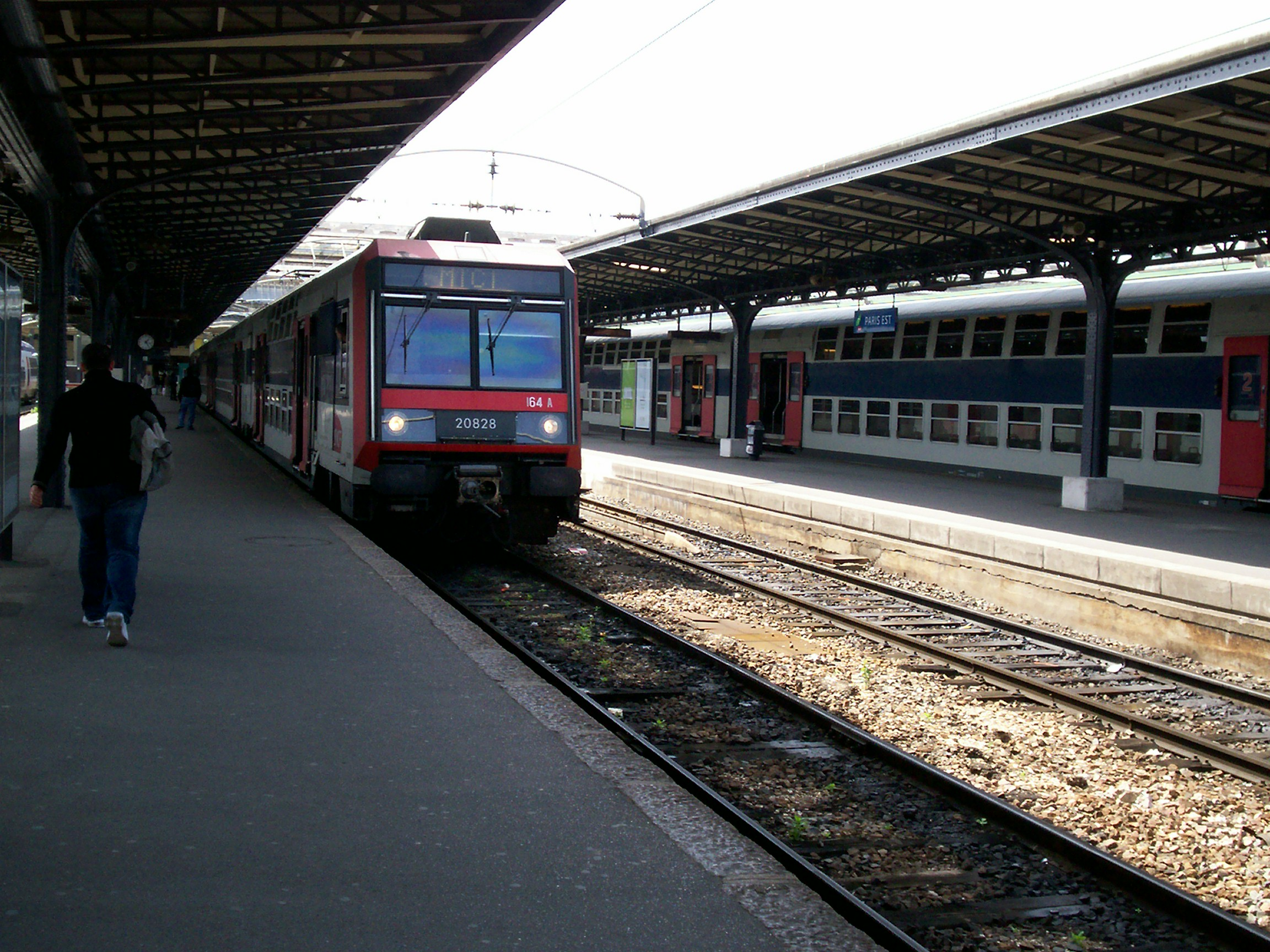 Train Z 20800 assurant la mission MICI en gare de départ Paris-Est.